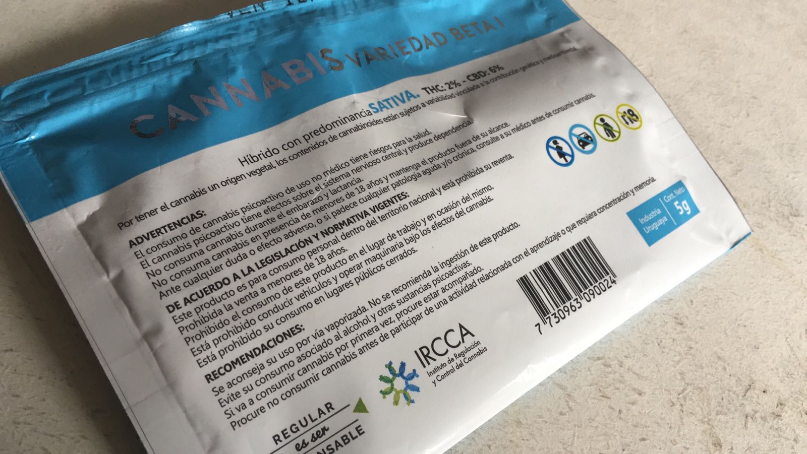 Foto del exterior del sobre Beta I, predominante Sativa